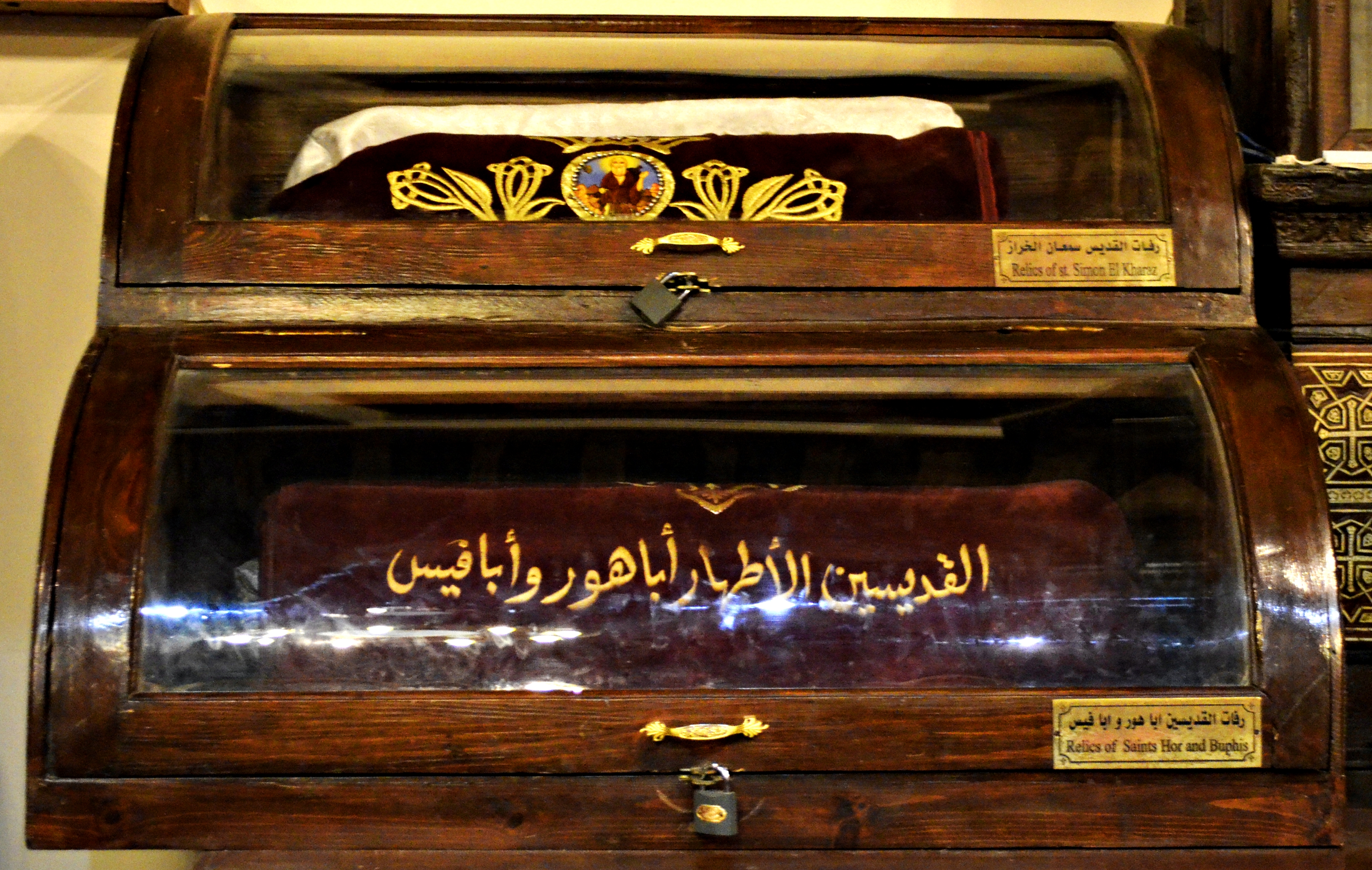 قديسون مصريون